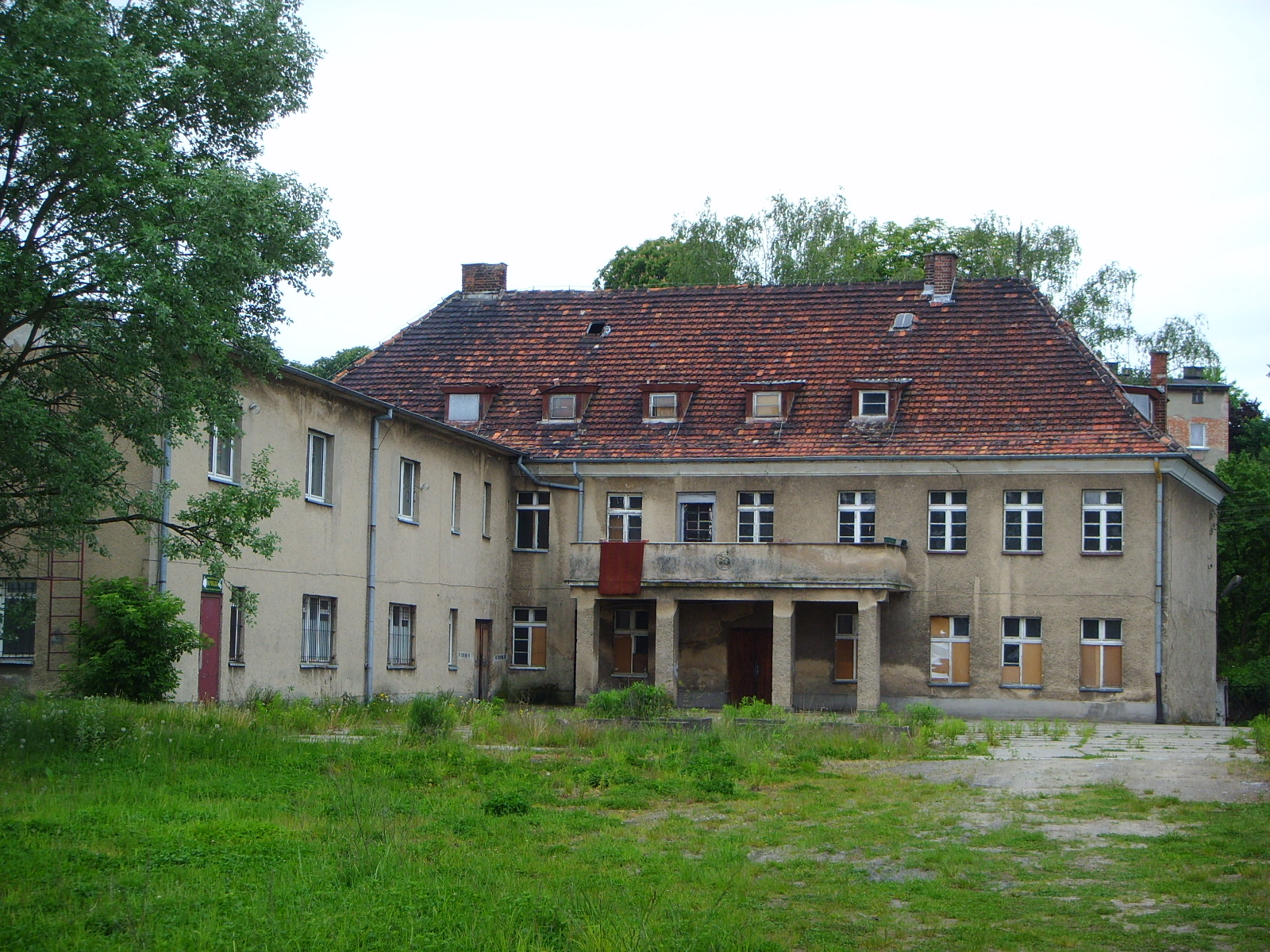 Byłe koszary strażnicy Golęcino WOP w Szczecinie (ul. Strzałowska 16)